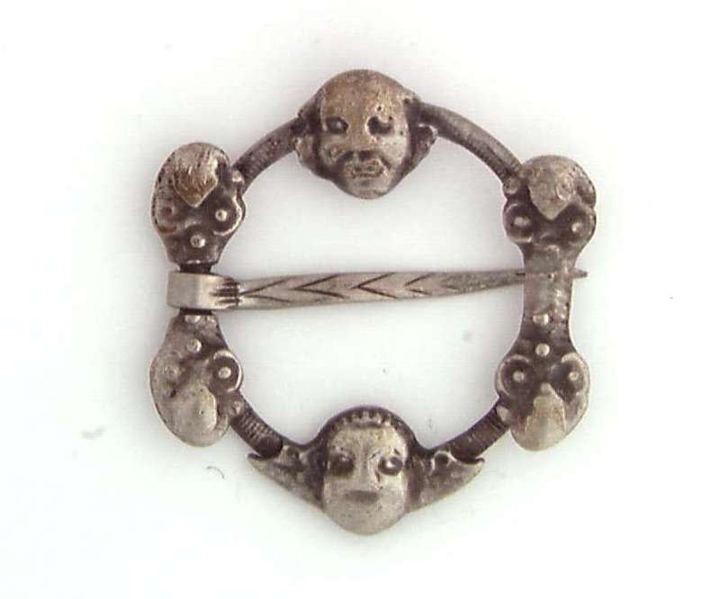 Glibbring i sølv. Innkjøpt i Nore og Uvdal i 1897. Foto Anne-Lise Reinsfelt / Norsk Folkemuseum, NF.1897-0070.